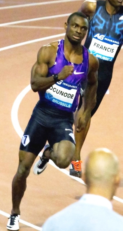 Men 200 m during Memorial Van Damme 2015, Brussels : Femi Ogunode